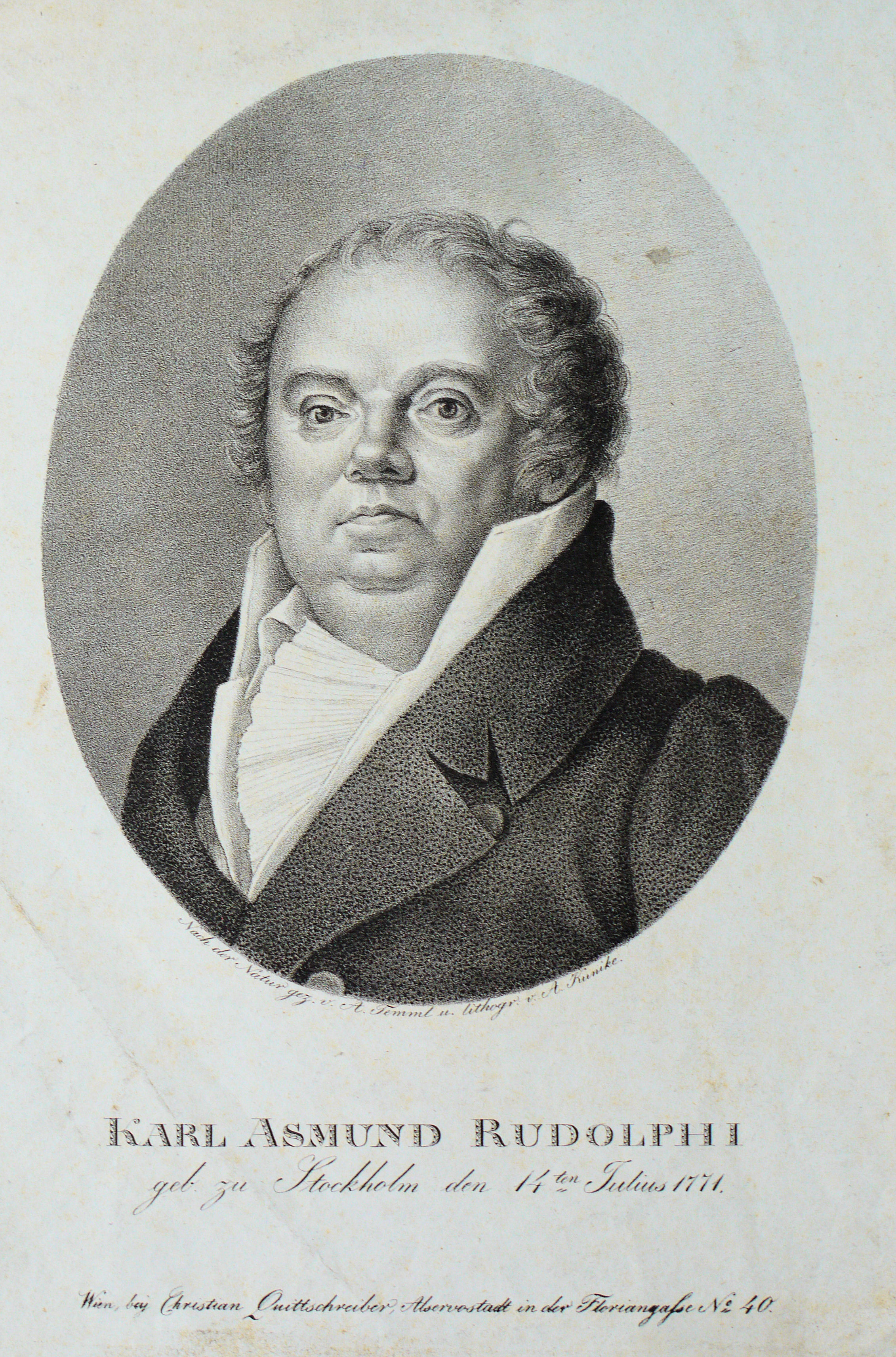 Karl Asmund Rudolphi (1771-1832), Naturforscher, Botaniker. Zoologe Lithographie von Adolf Kunike, um 1820